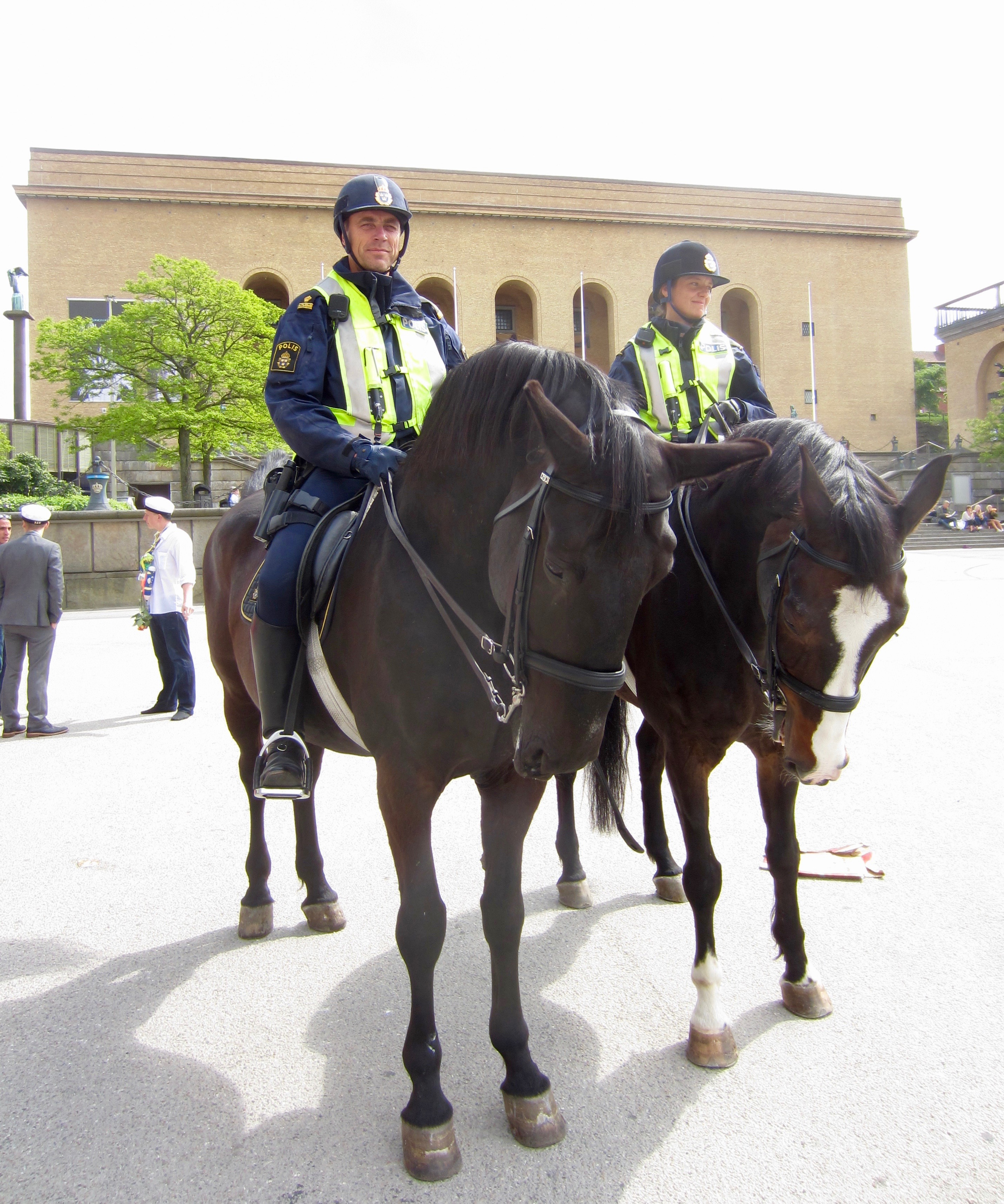 Poliser till häst vid Götaplatsen i Göteborg.